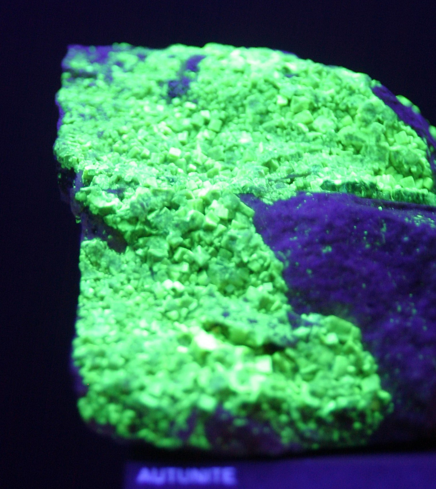 Imagem retocada de autunita sob Luz ultra-violeta